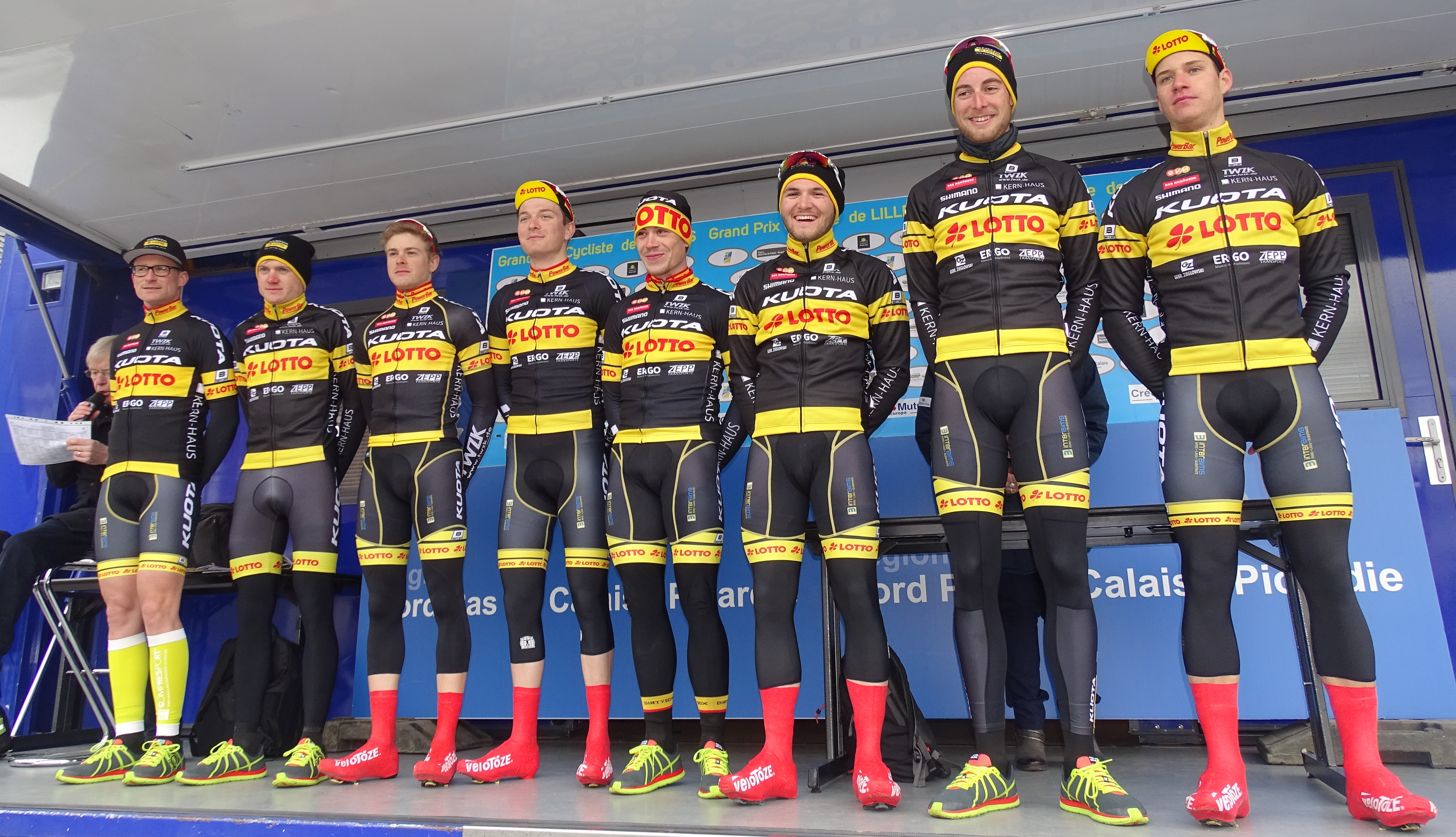 Reportage réalisé le dimanche 6 mars à l'occasion du départ et de l'arrivée du Grand Prix de Lillers-Souvenir Bruno Comini 2016 à Lillers, Pas-de-Calais, Nord-Pas-de-Calais, France.